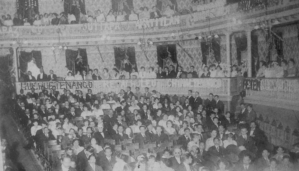 Interior del Teatro Colón en 1916, durante una celebración de los departamentos de Guatemala